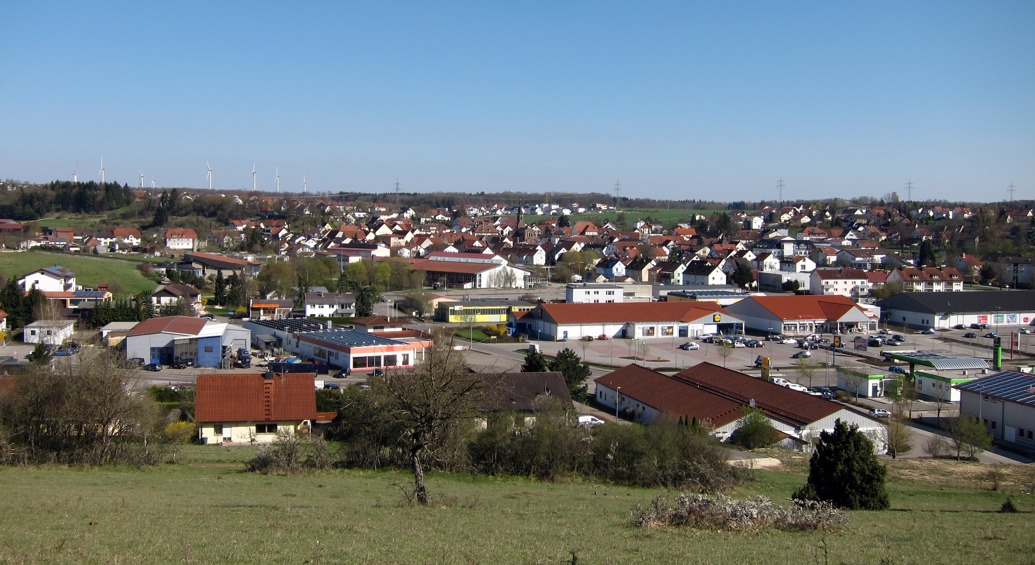 Blick auf Nattheim